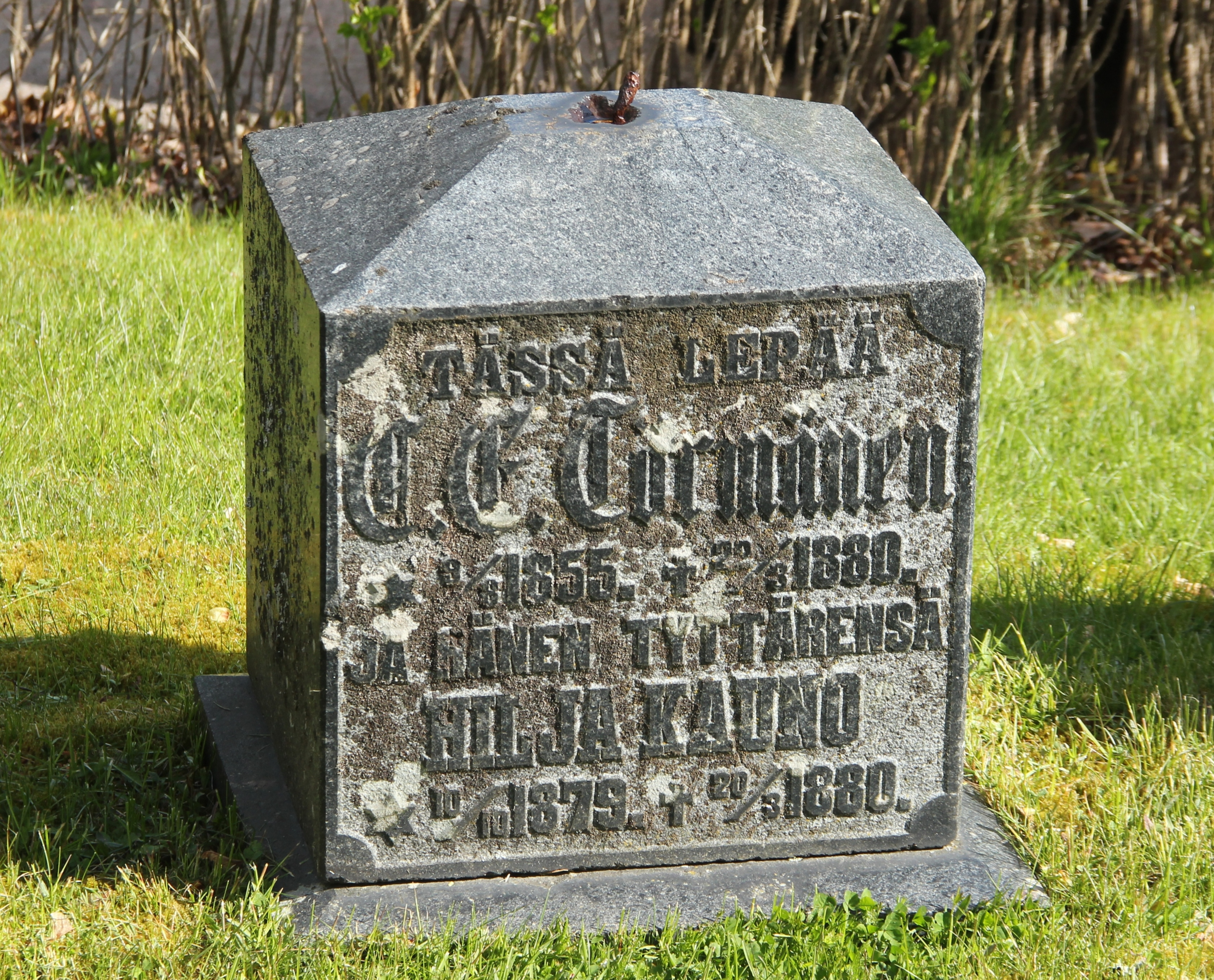 Näyttelijä, kirjailija C. Edv. Törmänen, hauta, Vihdin hautausmaa, Vihti